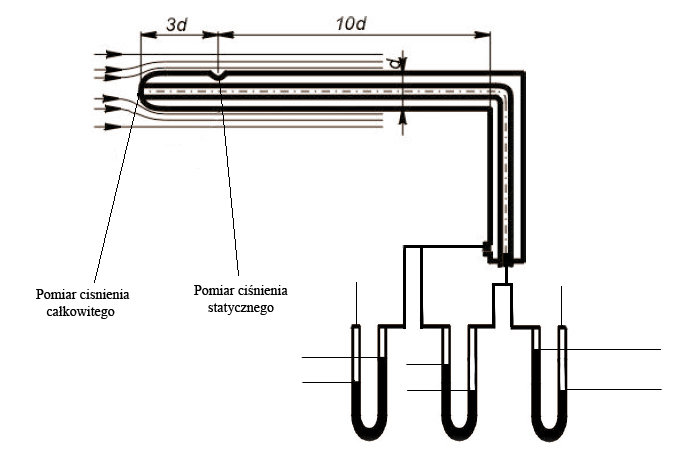 Obrazek opisujący zasadę pomiaru ciśnienia płynów przy pomocy rurki Prandtla.